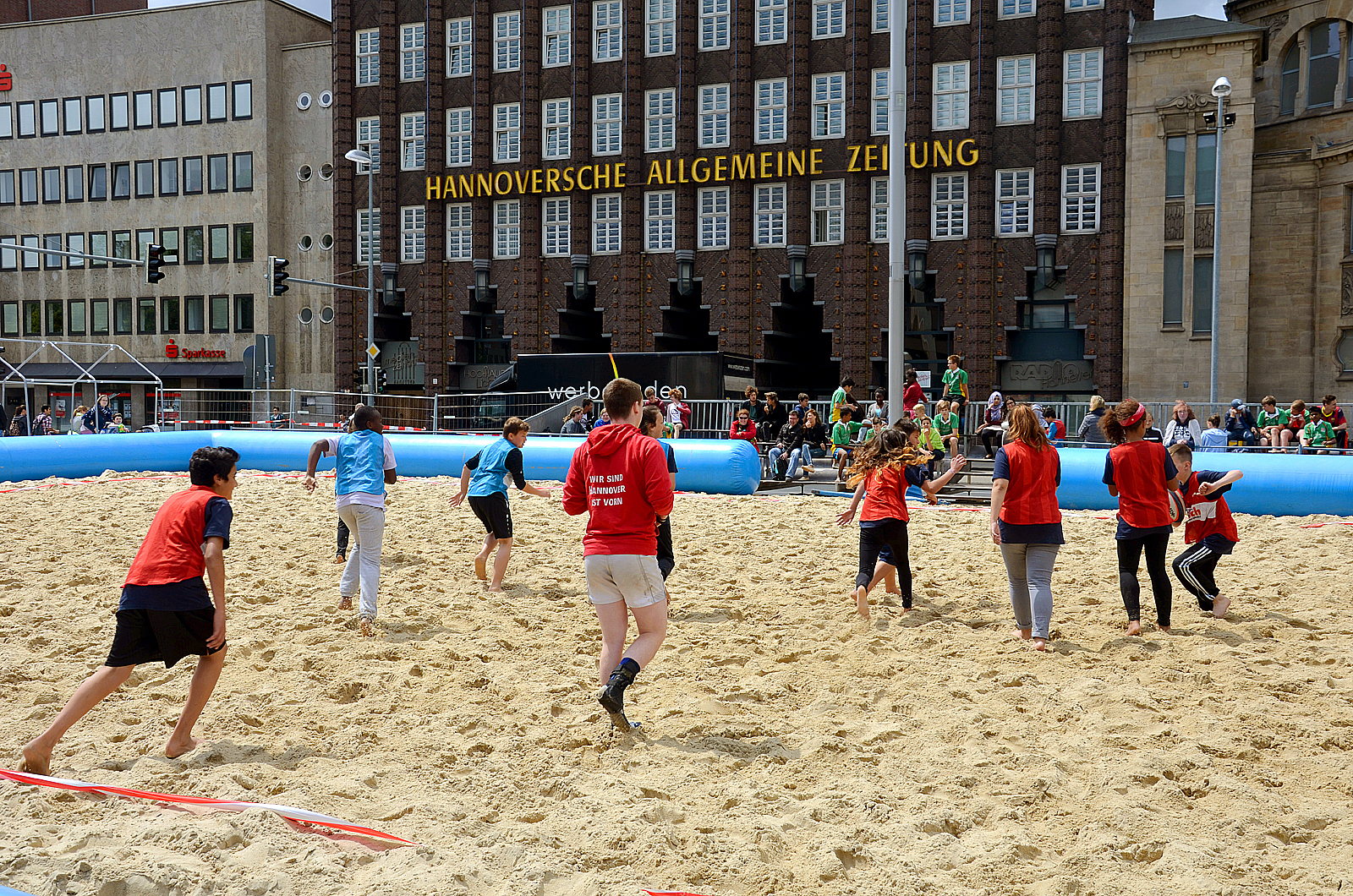 Für den 10. bis 12. Juli 2015 organisierte Horst Josch vom SV Odin von 1905 anlässlich der Hannover City Cup summer games die mittlerweile „Dritte offene Deutsche Beachrugby-Meisterschaft 2015“, Austragungsort ist der Platz der Goseriede zwischen dem Tiedthof, dem Anzeiger-Hochhaus und der Nikolaikapelle in Hannover. Den sportlichen Anfang machte am Freitag das Schul-Beachrugby-Turnier mit Schülern verschiedener Schulen ...